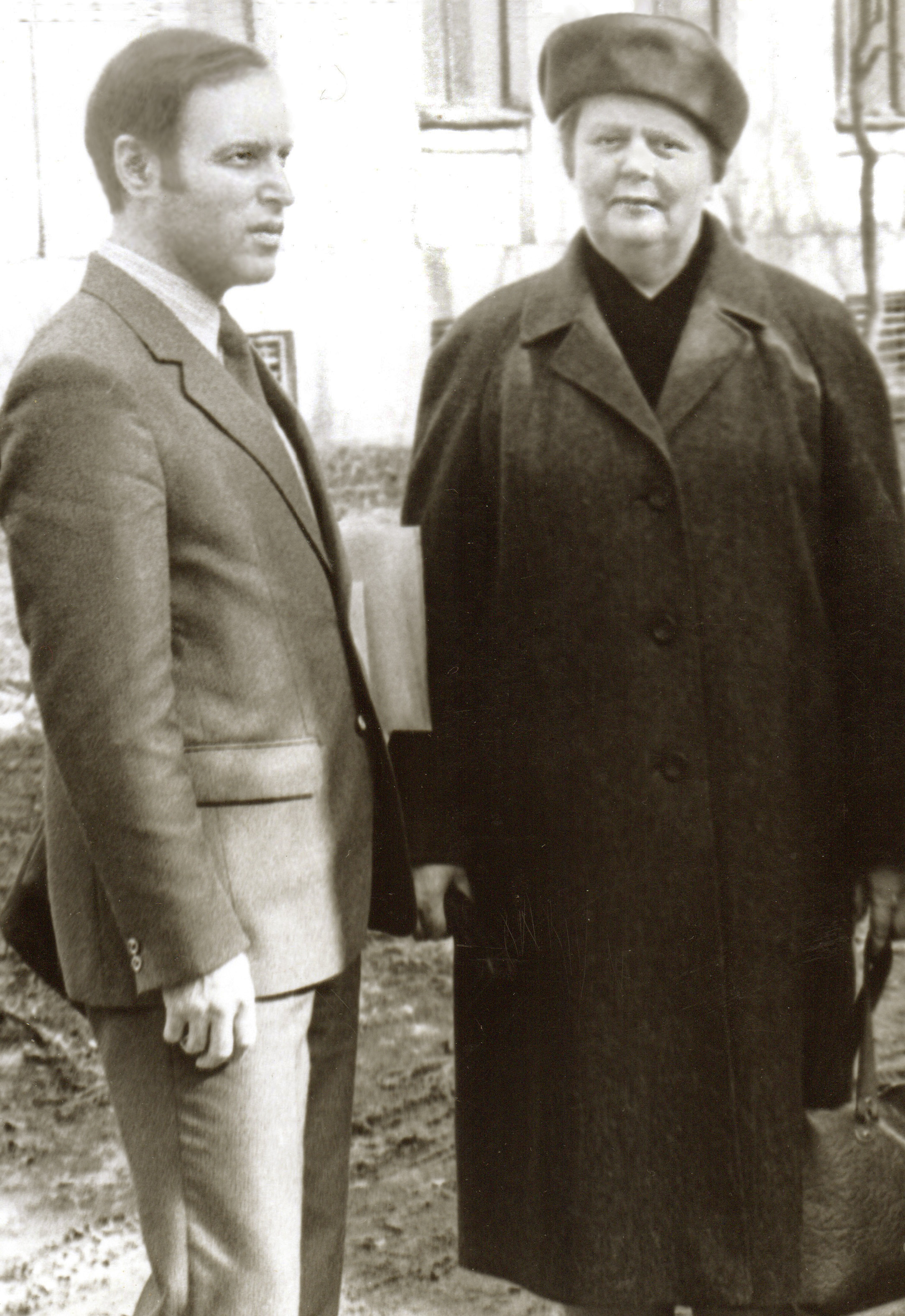 Заведующая кафедрой фармакологии ЛПМИ профессор Ирина Валерьевна Маркова со своим учеником, профессором Вильямом Анатольевичем Гуселем